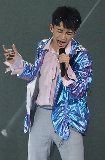 2019年8月13日，黄子弘凡于“你眼里的蓝之音色幻想”演唱会·上海站